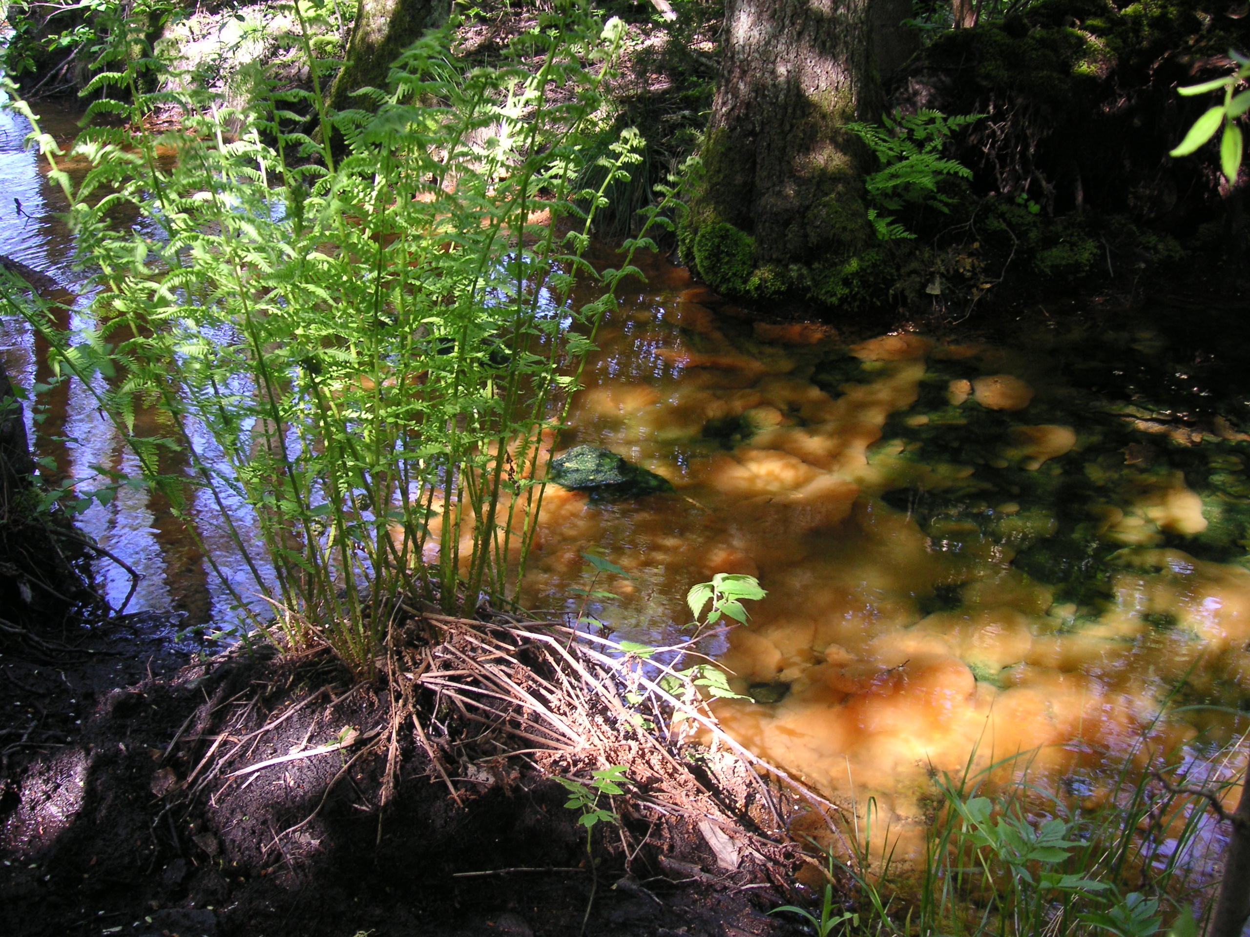 Botvids källa vid Bornsjön i Botkyrka, Sverige